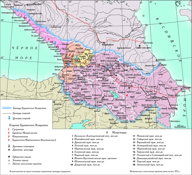 Грузинский Экзархат Святейшего Синода Православной Российской Церкви (1811 - 1917)